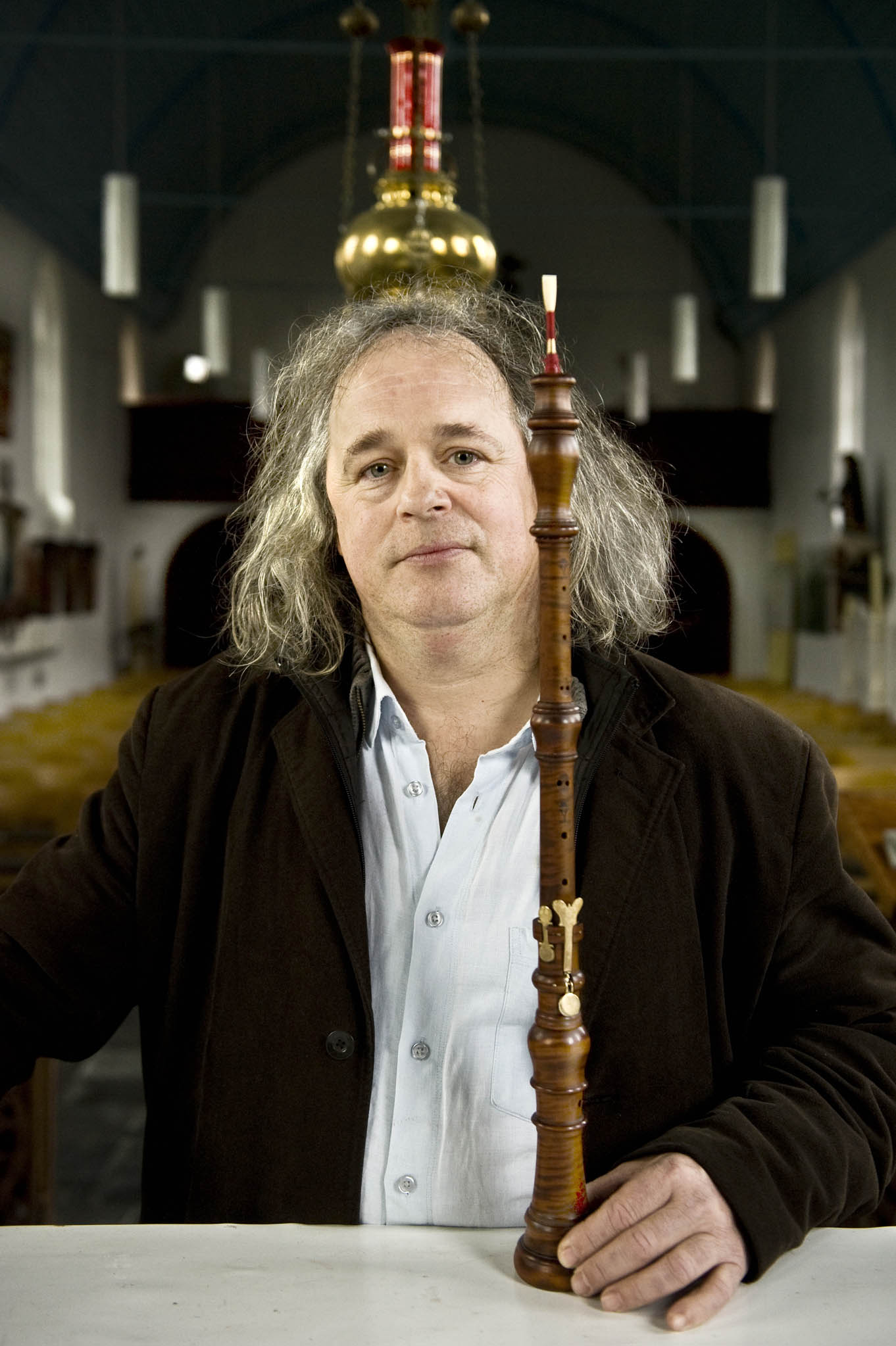 Marcel Ponseele, Belgisch barokhoboïst.